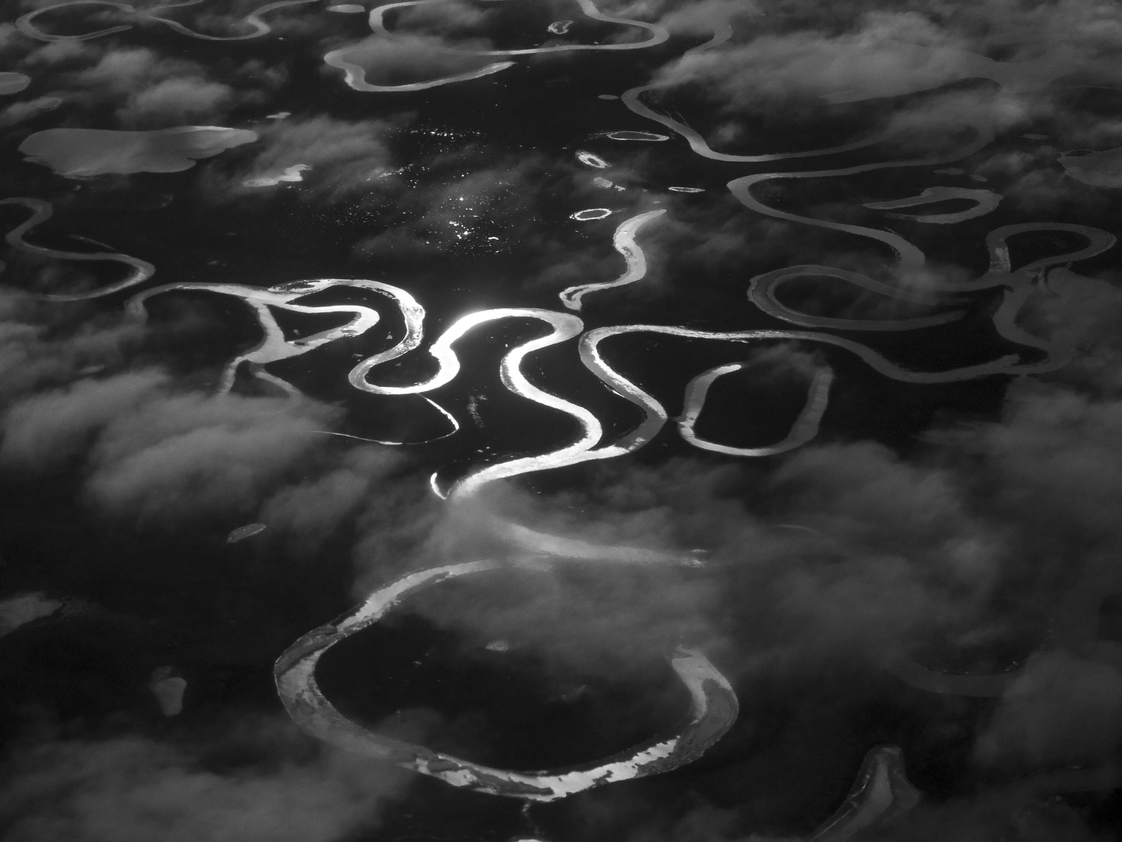 Continental Divide- 9418edit resize